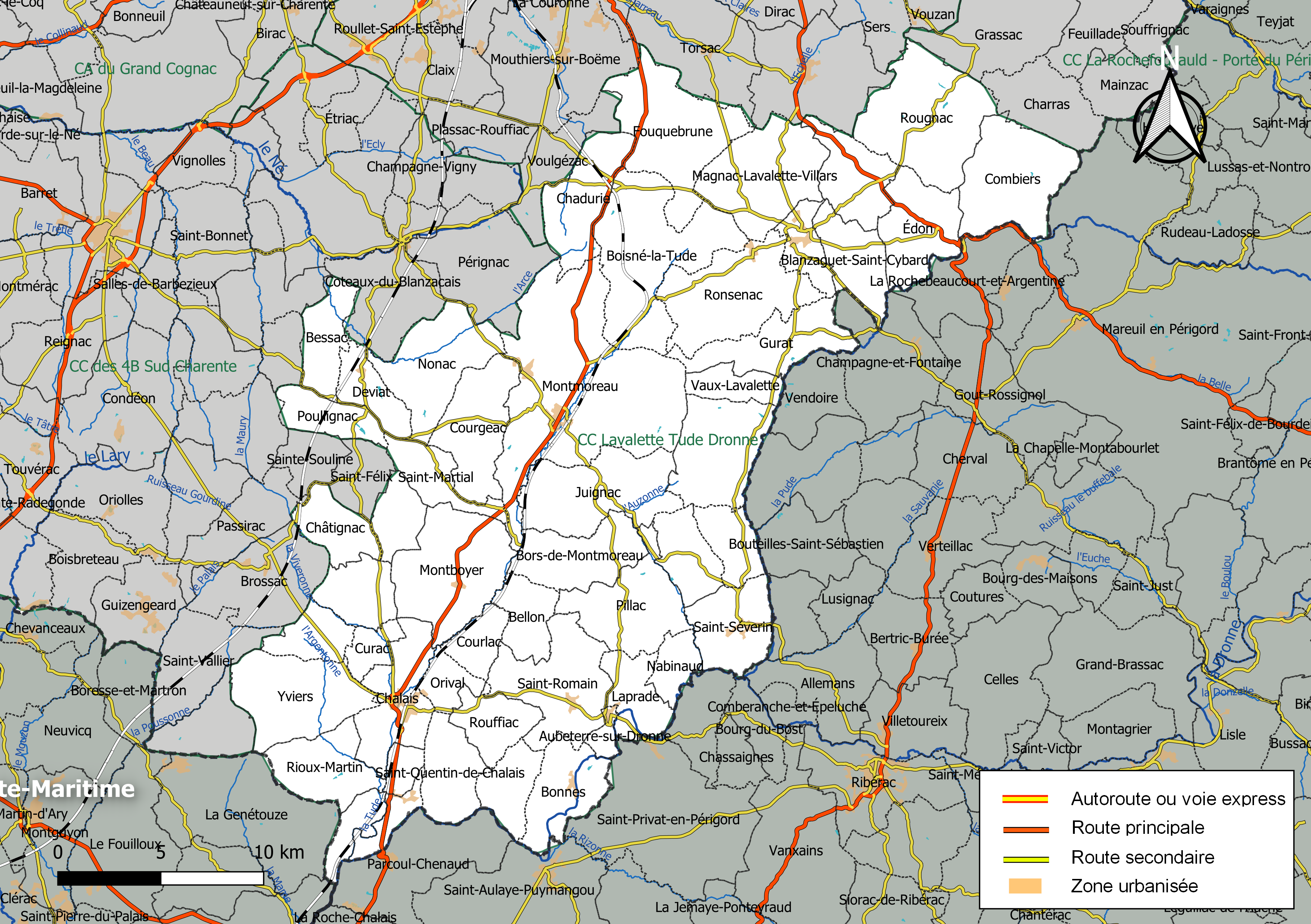 Carte géographique de la Communauté de communes Lavalette Tude Dronne, département de Maine-et-Loir, France. Composition au 1er janvier 2019.